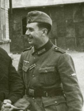 Aznar, Mora-Figueroa